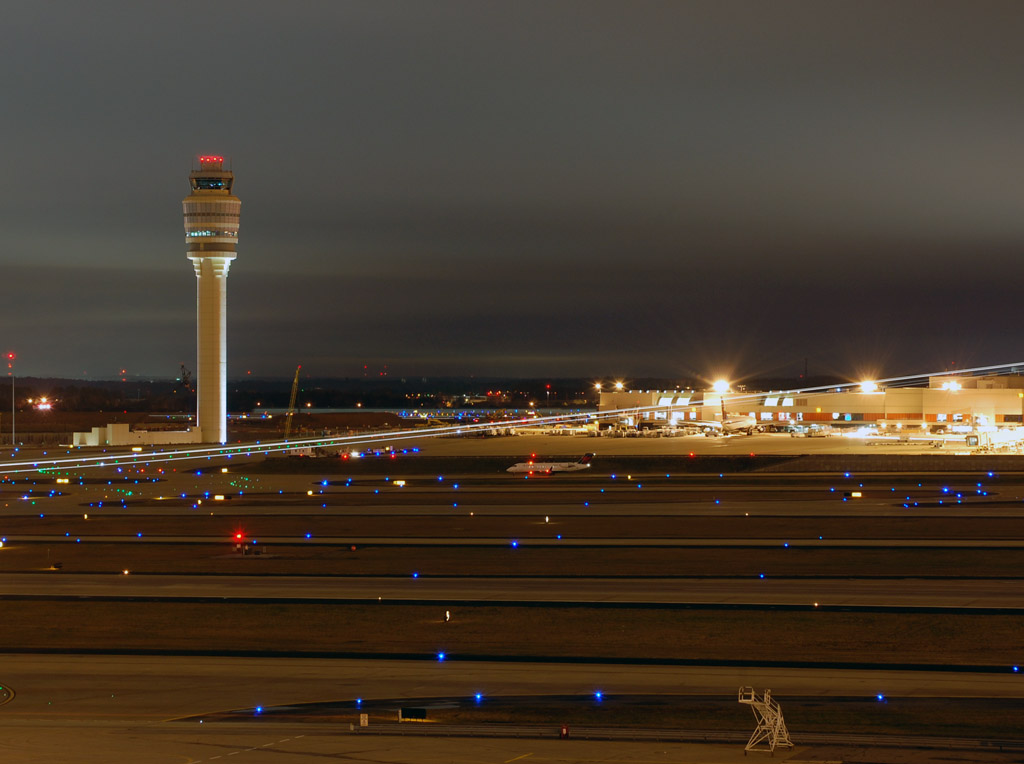 ATL 12-29-08